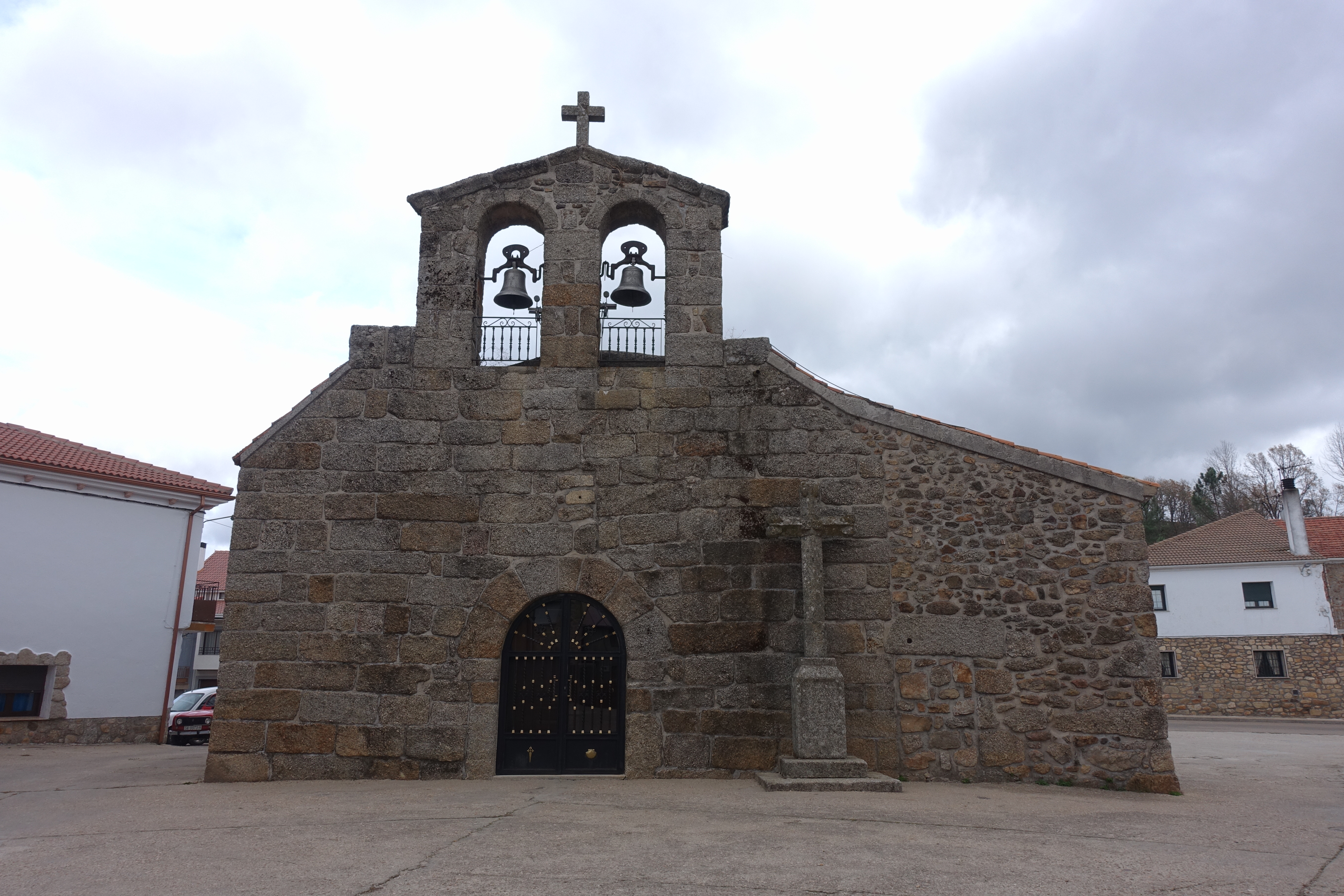 Iglesia de Santiago Apóstol, El Payo (Salamanca, España).